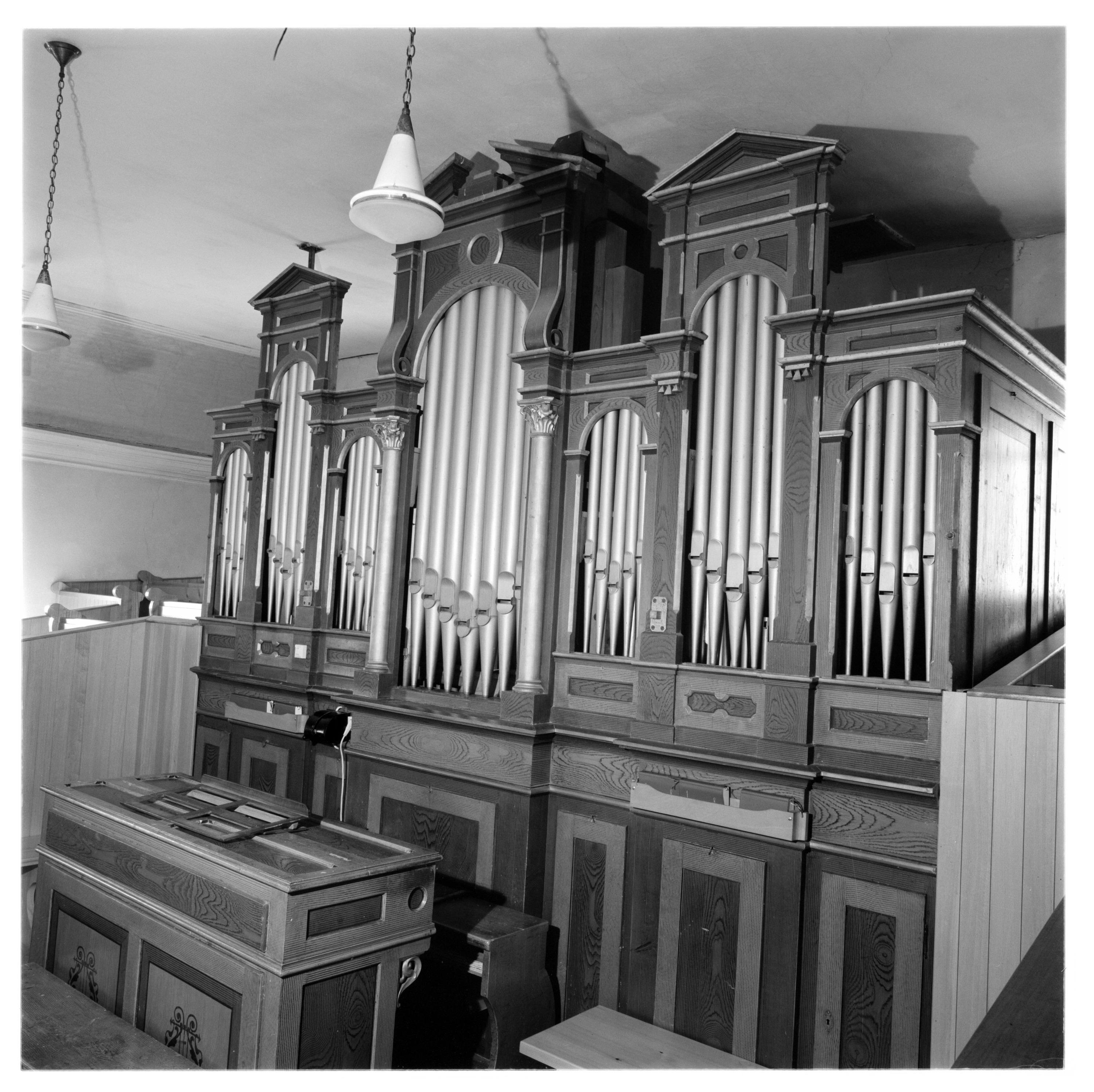 Orgelaufnahme